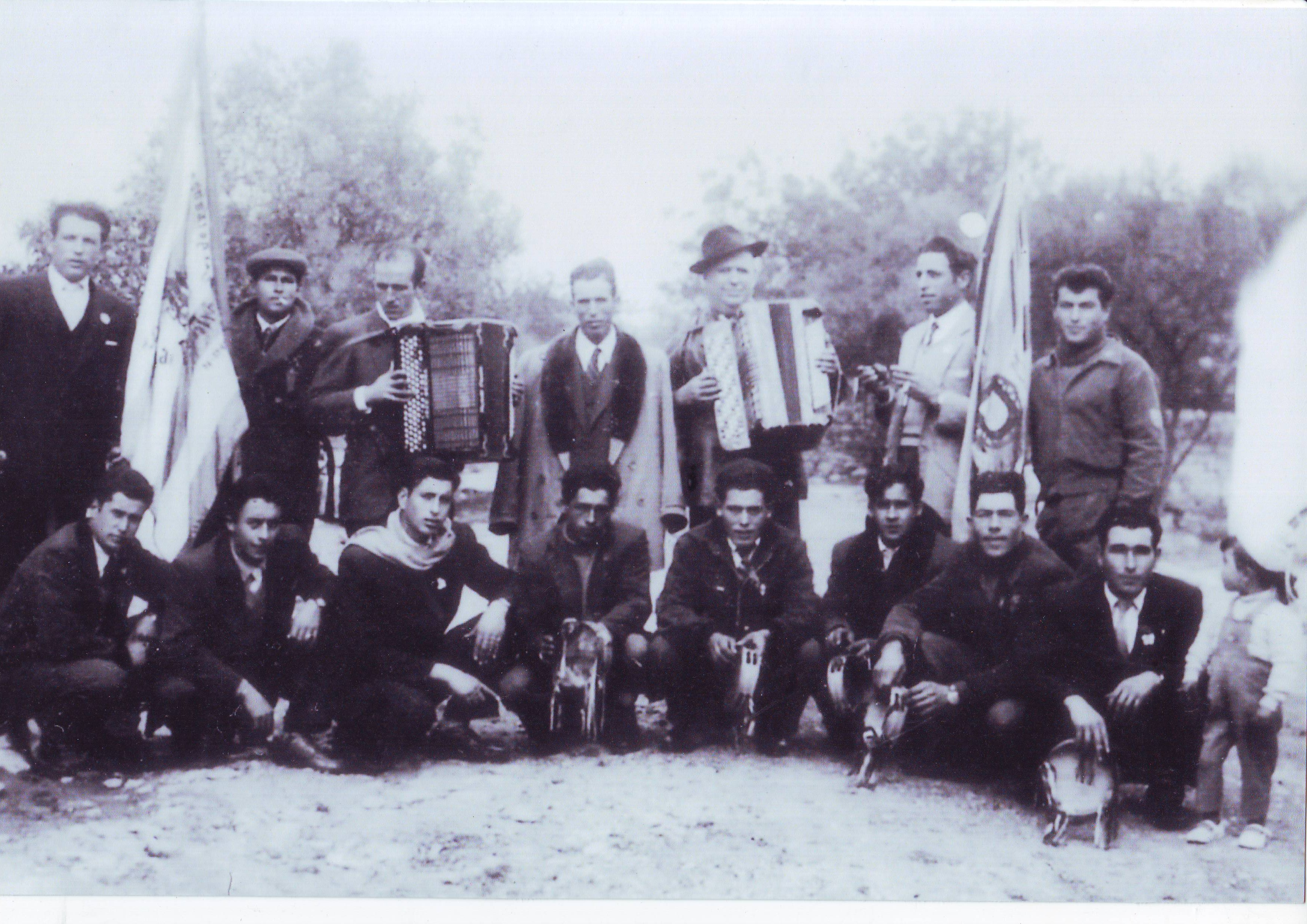 Charolas de Bordeira nos anos sessenta,jose Ferreiro (Pai) e João Barra Bexiga